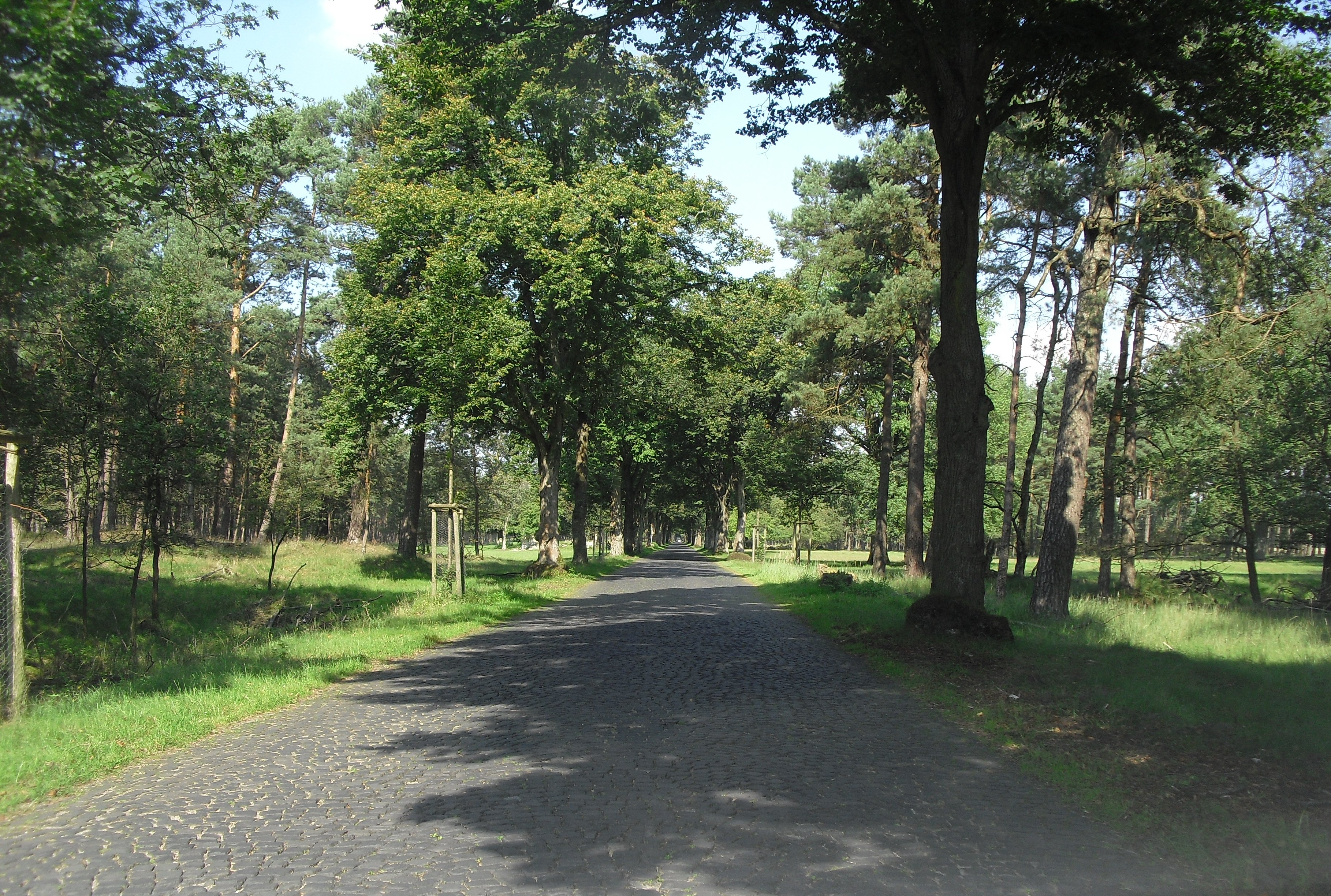 Haustenbeck: Straße Richtung Augustdorf, "Allee des Jahres" 2013 (ausgezeichnet vom BUND)